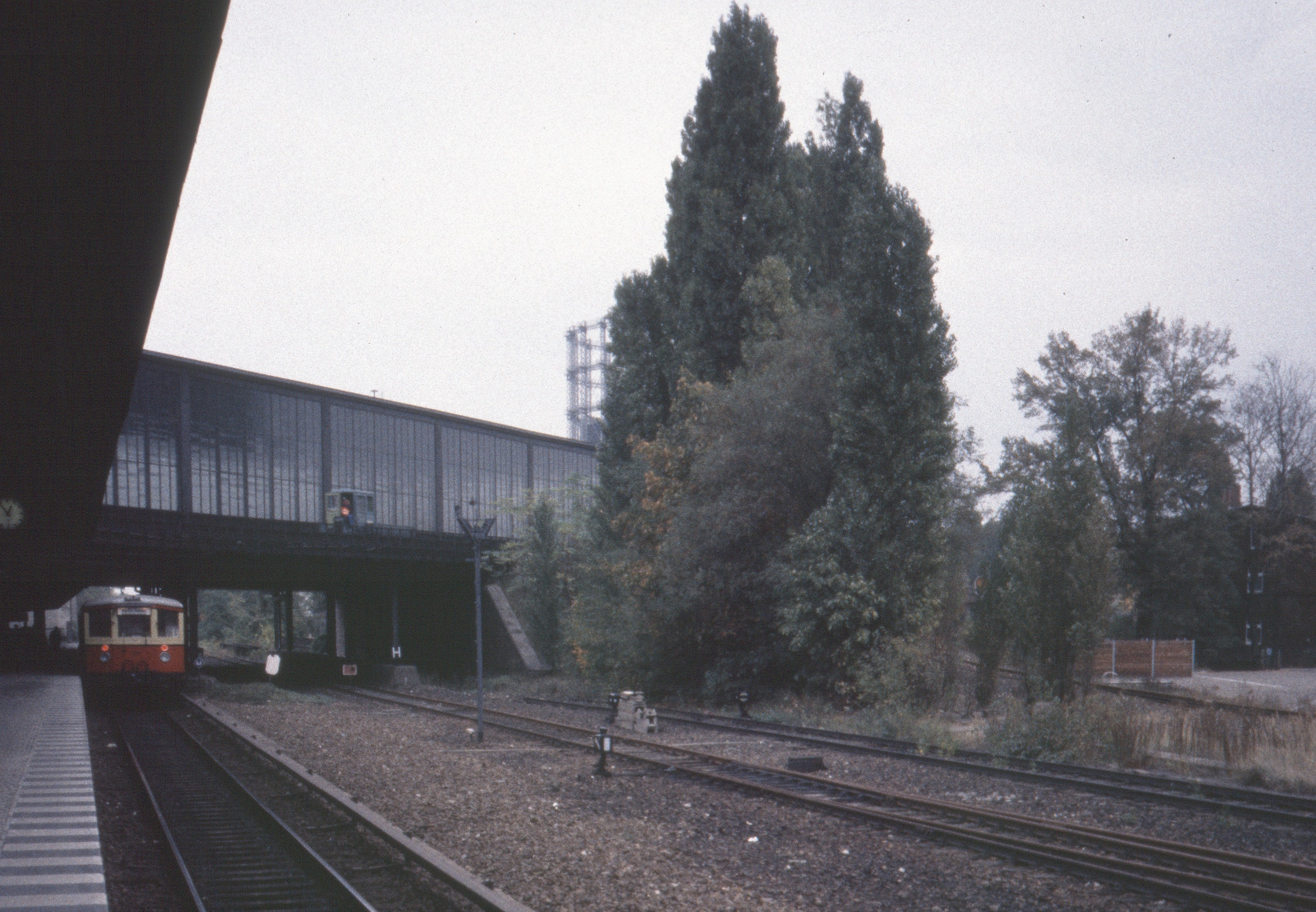 Bahnhof Berlin-Schöneberg